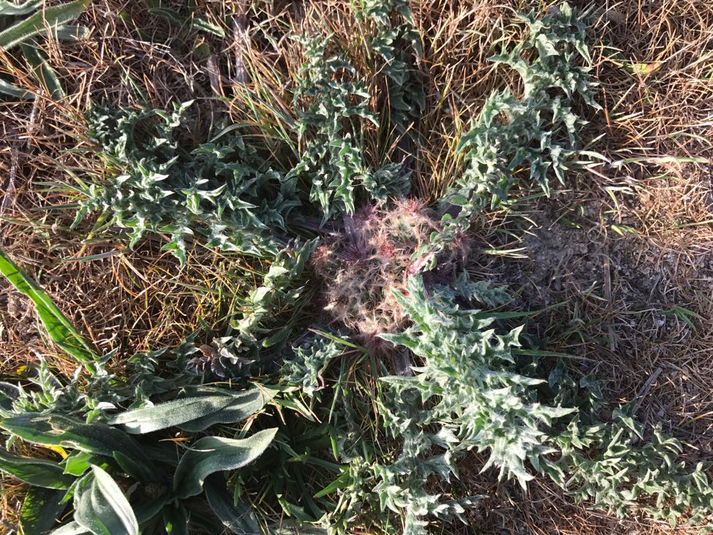 Centaurea amblensis en La Torre Ávila España.